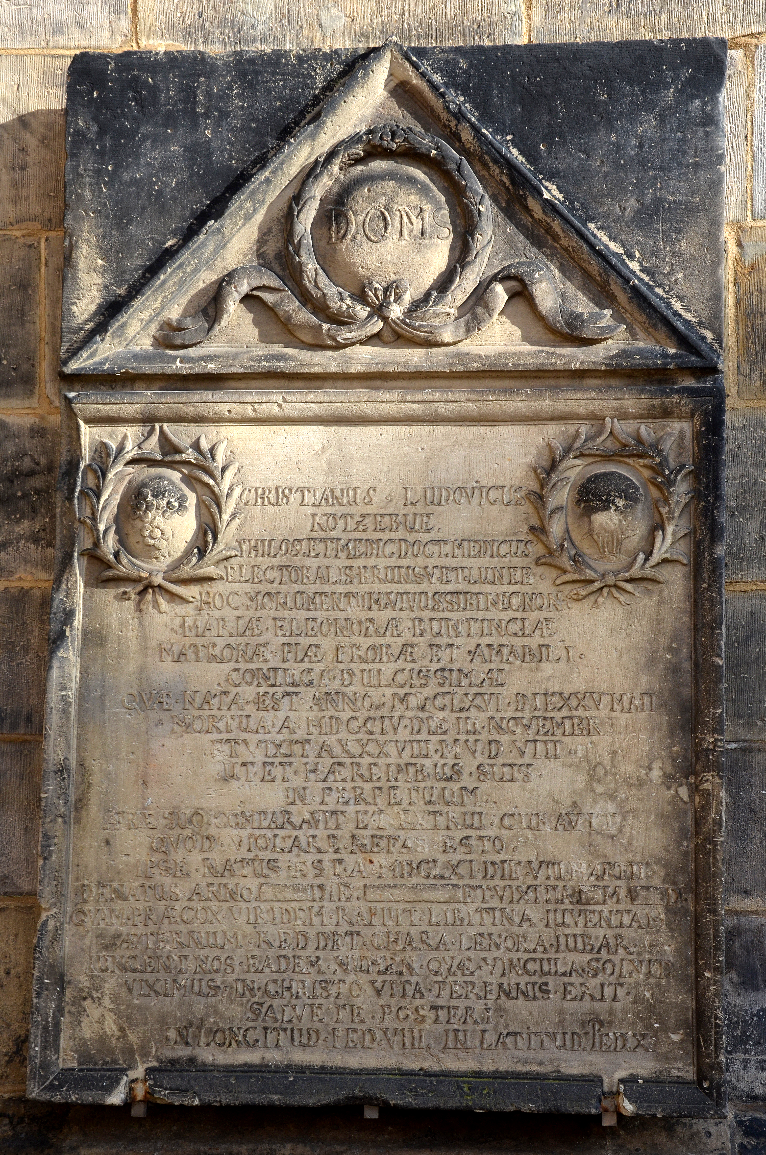 Grabstein (heute Epitaph) an der nördlichen Kirchturmmauer der Neustädter Hof- und Stadtkirche St. Johannis in Hannover, Stadtteil Calenberger Neustadt, für den Kurfürstlich Hannoverschen Leibarzt, Historiker und Genealogen Christian Ludwig Kotzebue (geboren am 8. März 1661 in Celle; gestorben am 12. September 1706 in Hannover) und dessen Ehefrau Maria Eleonore Bünting (geboren 25. Mai 1666; gestorben 2. November 1704) in lateinischer Sprache. Im oberen Feld die Abkürzung „D. O. M. S.“ für Deo Optimo Maximo Sacrum, übersetzt etwa "Gott, dem Höchsten und Größten geweiht". Darunter, links und rechts des lateinischen Textfeldes die Wappen (?), links mit drei Blüten, rechts mit ...